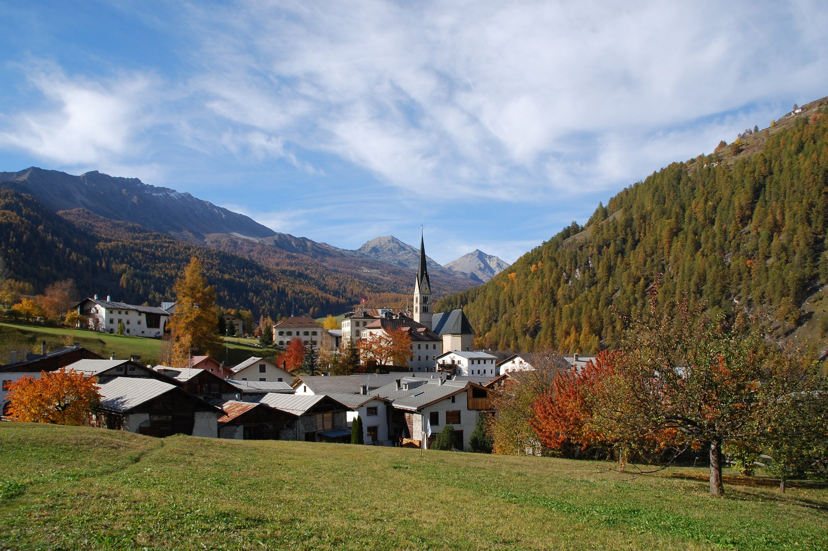 Blick auf Santa Maria Val Müstair in Graubünden